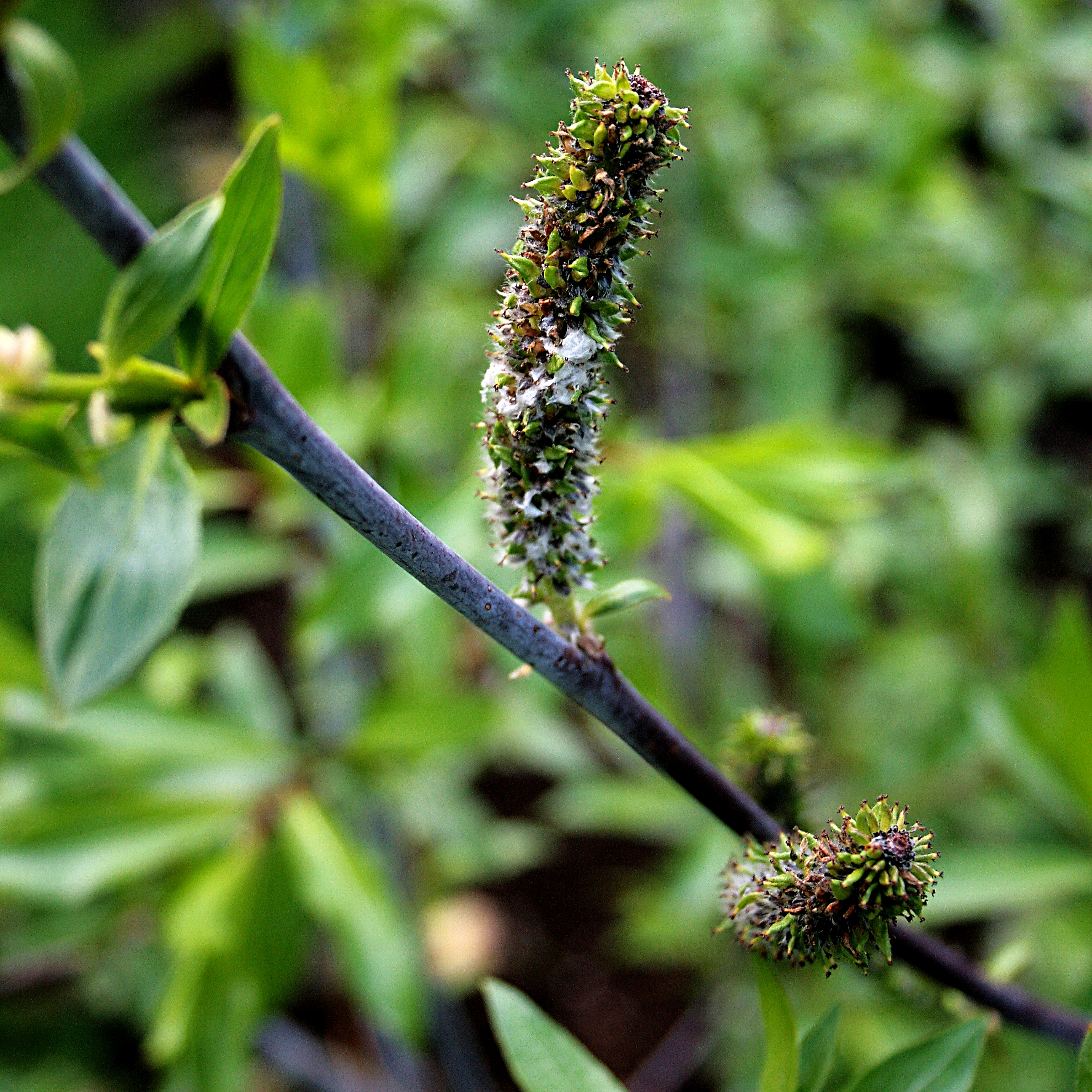 Ísland, Akureyri Botanical Gardens: Weide Salix_daphnoides